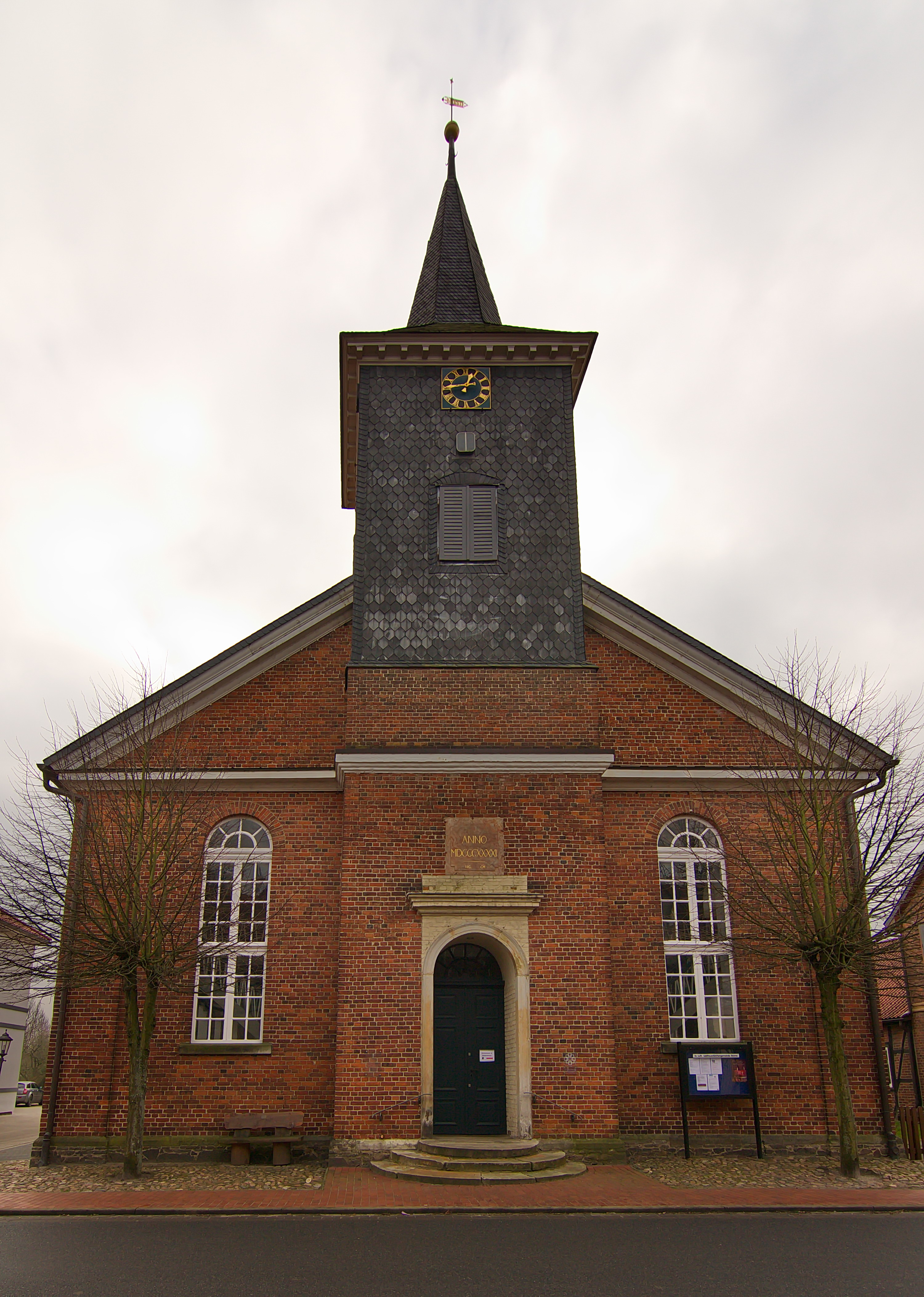 Liebfrauenkirche in Brome, Niedersachsen, Deutschland